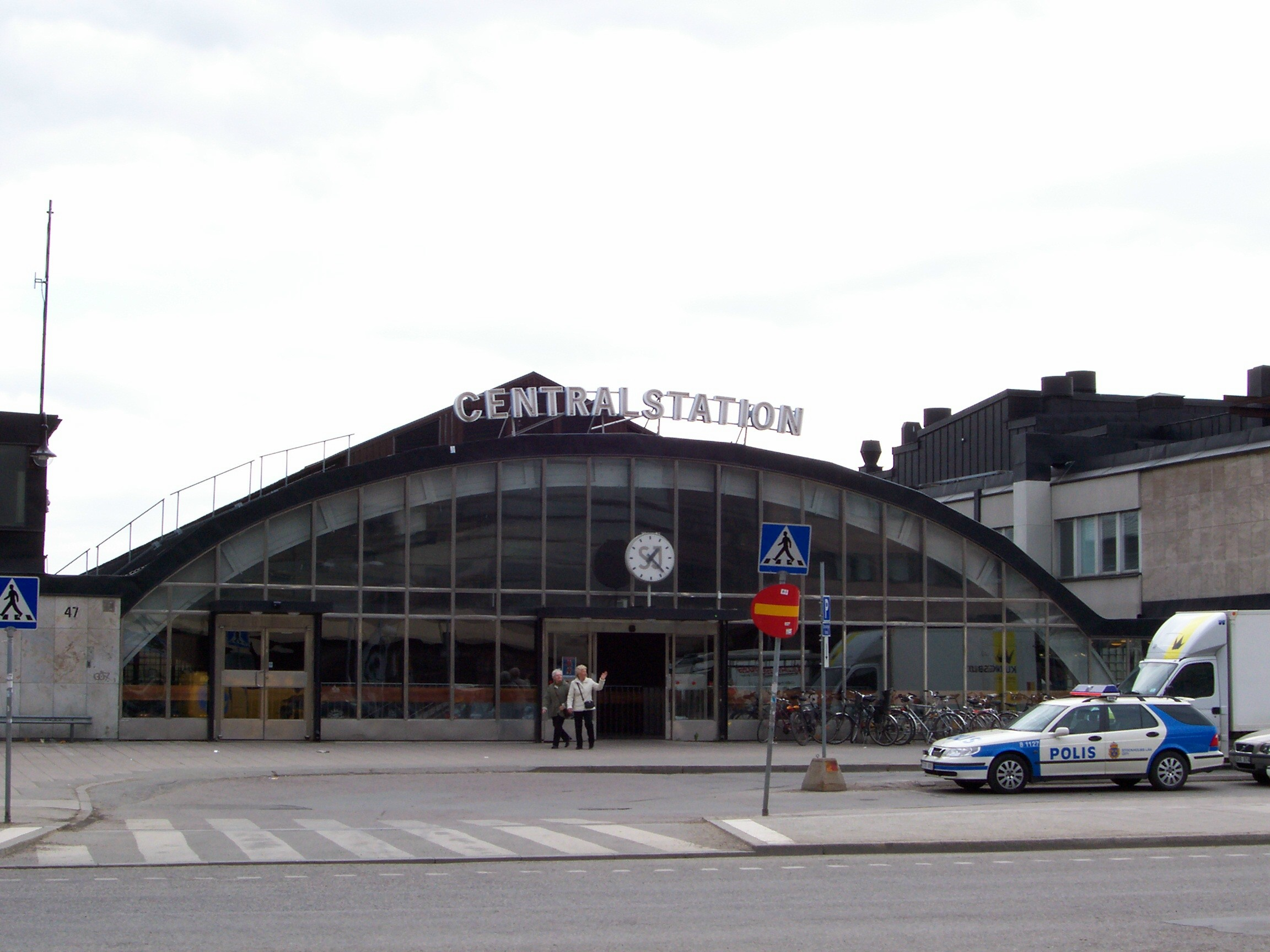 Stockholm Central Station entrance / Stockholm Central ingång